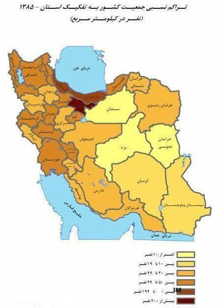 نقشه تراکم جمعیتی استانهای ایران در سال 1385 هجری خورشیدی